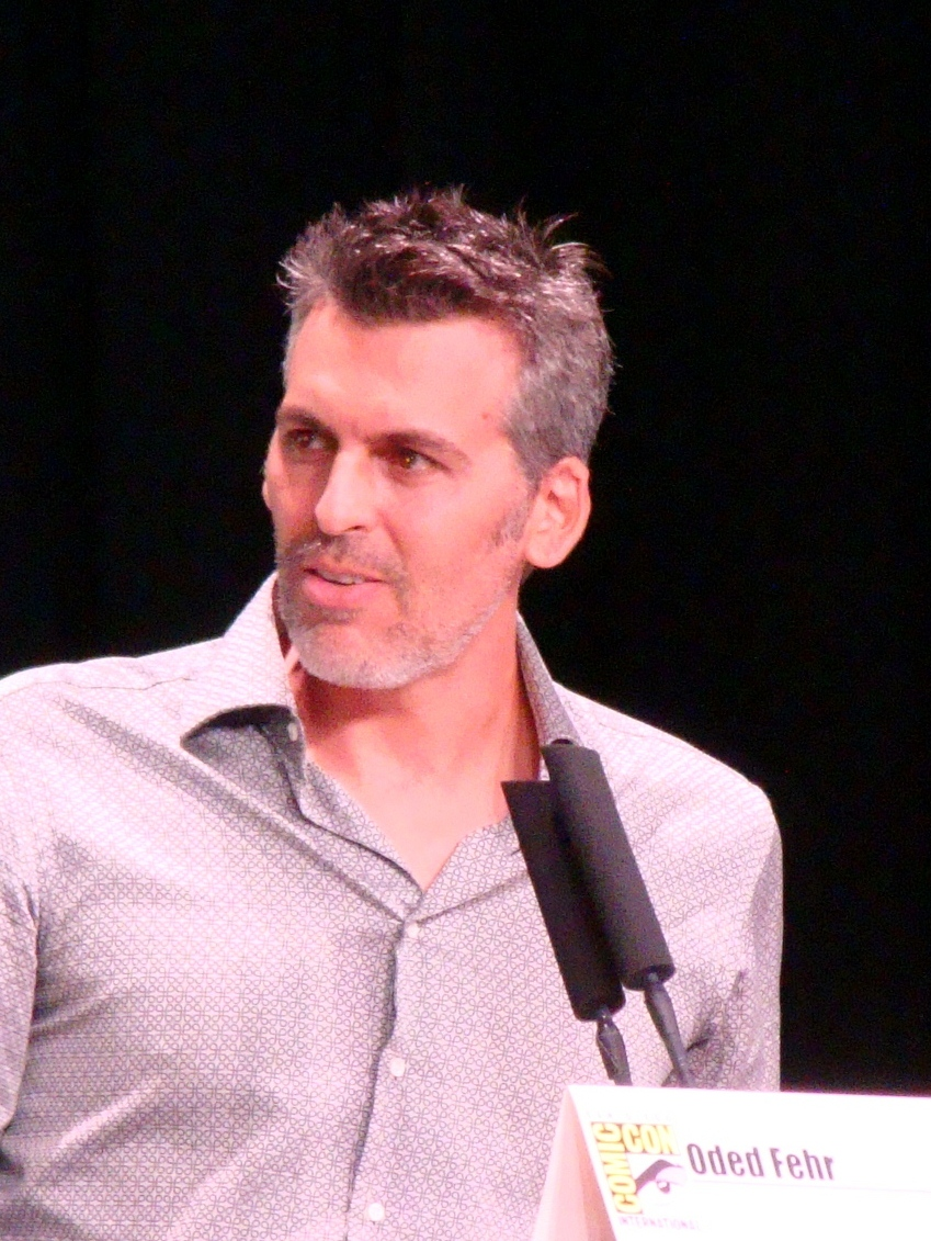 Oded Fehr, Recadrage, Original disponible